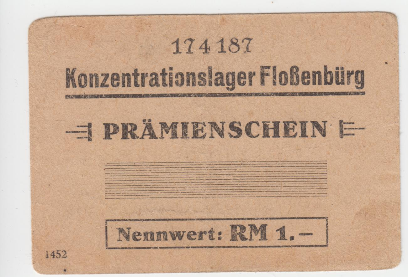 Prämienschein des KZ Flossenbürg von 1943 (Dokumentationsstück)